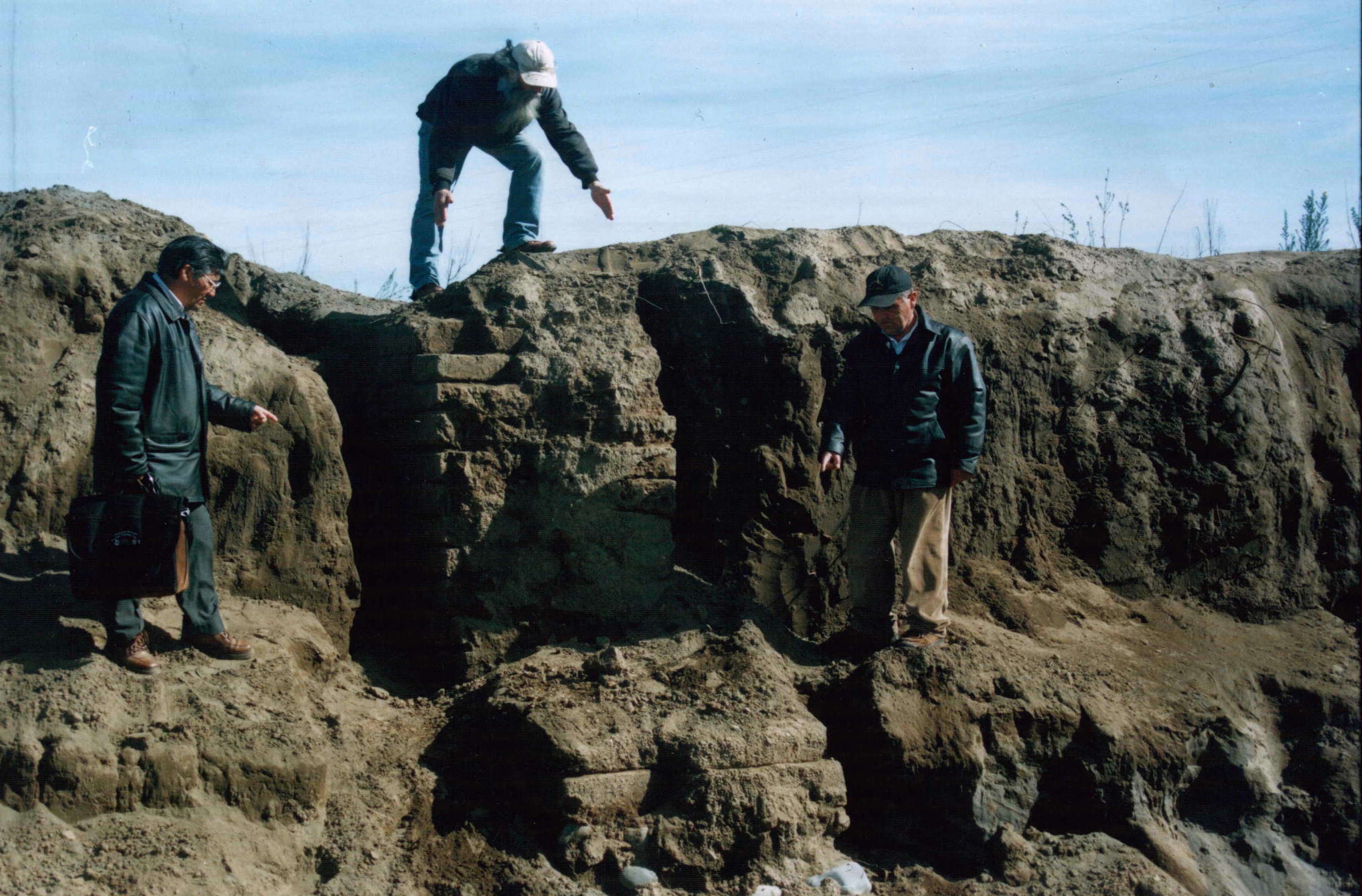 Hallazgo de muro enterrado, realizado por el escultor y artesano mapuche de Negrete Osvaldo Lipin Llancaman, en Septiembre de 2002, en los faldeos del cerro Mariman de Negrete. Actualmente declarado y protegido como Monumento Arqueologico por el Consejo de Monumentos Nacionales de Chile, segun ley 17.288.